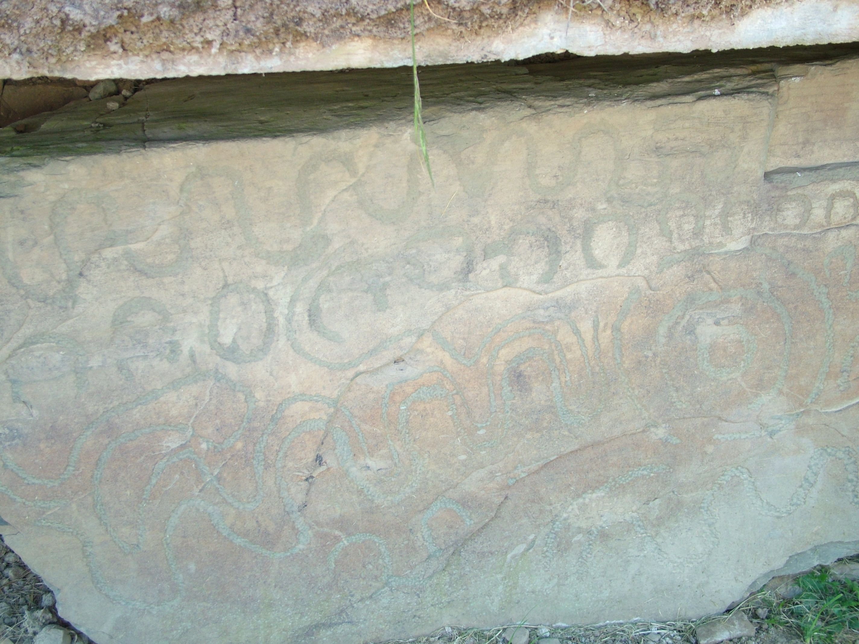 Knowth, Ireland, ein Stein am Hauptgrab